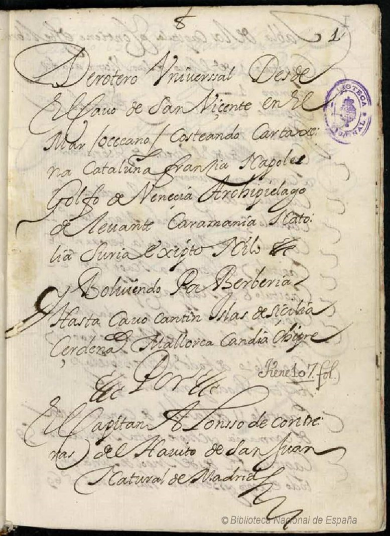 Primera página del Derrotero Universal... del capitán español Alonso de Contreras (siglo XVII)